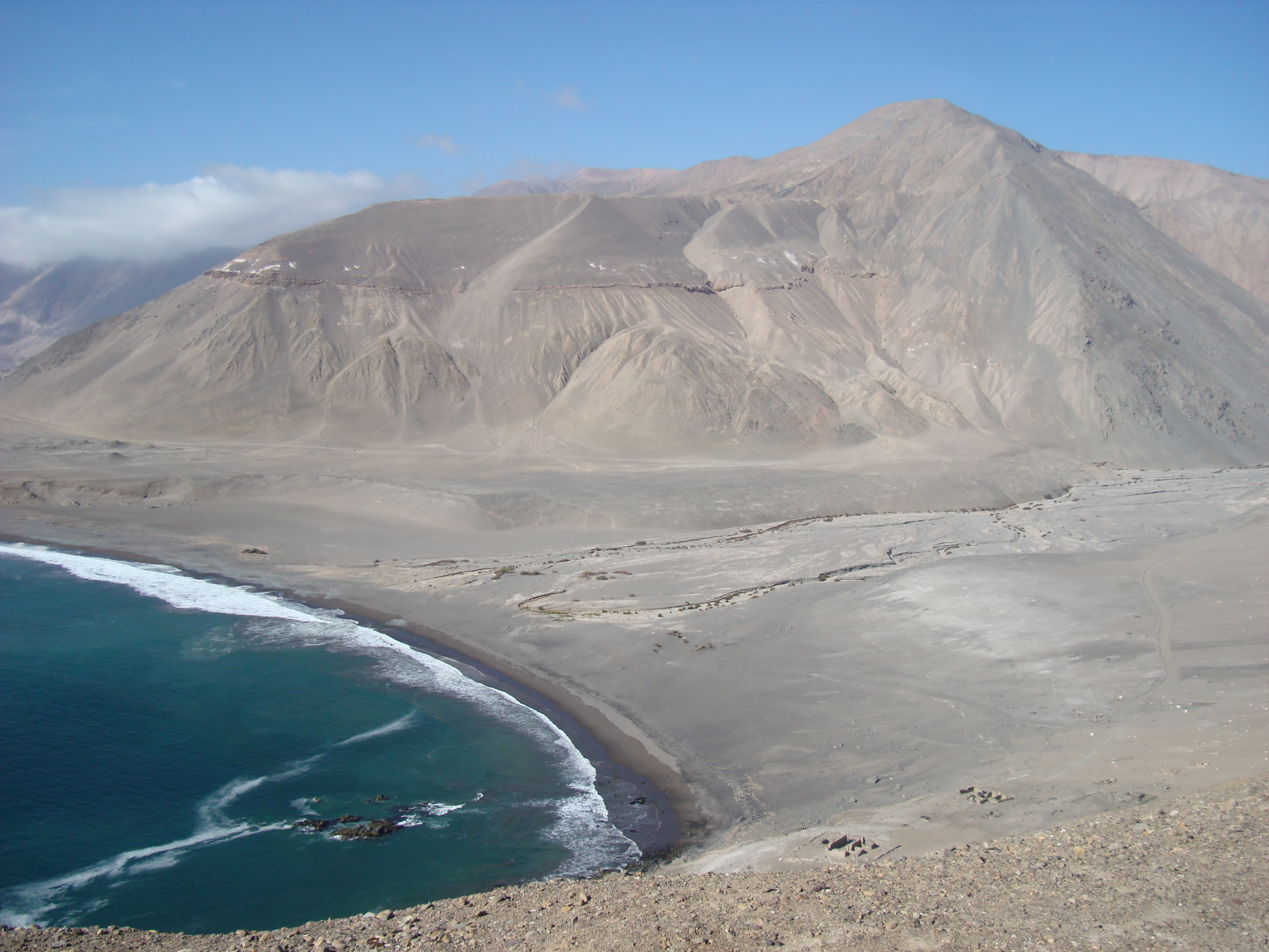 Pisagua, Desembocadura de la quebrada de Camiña en el Pacífico. nov 2017